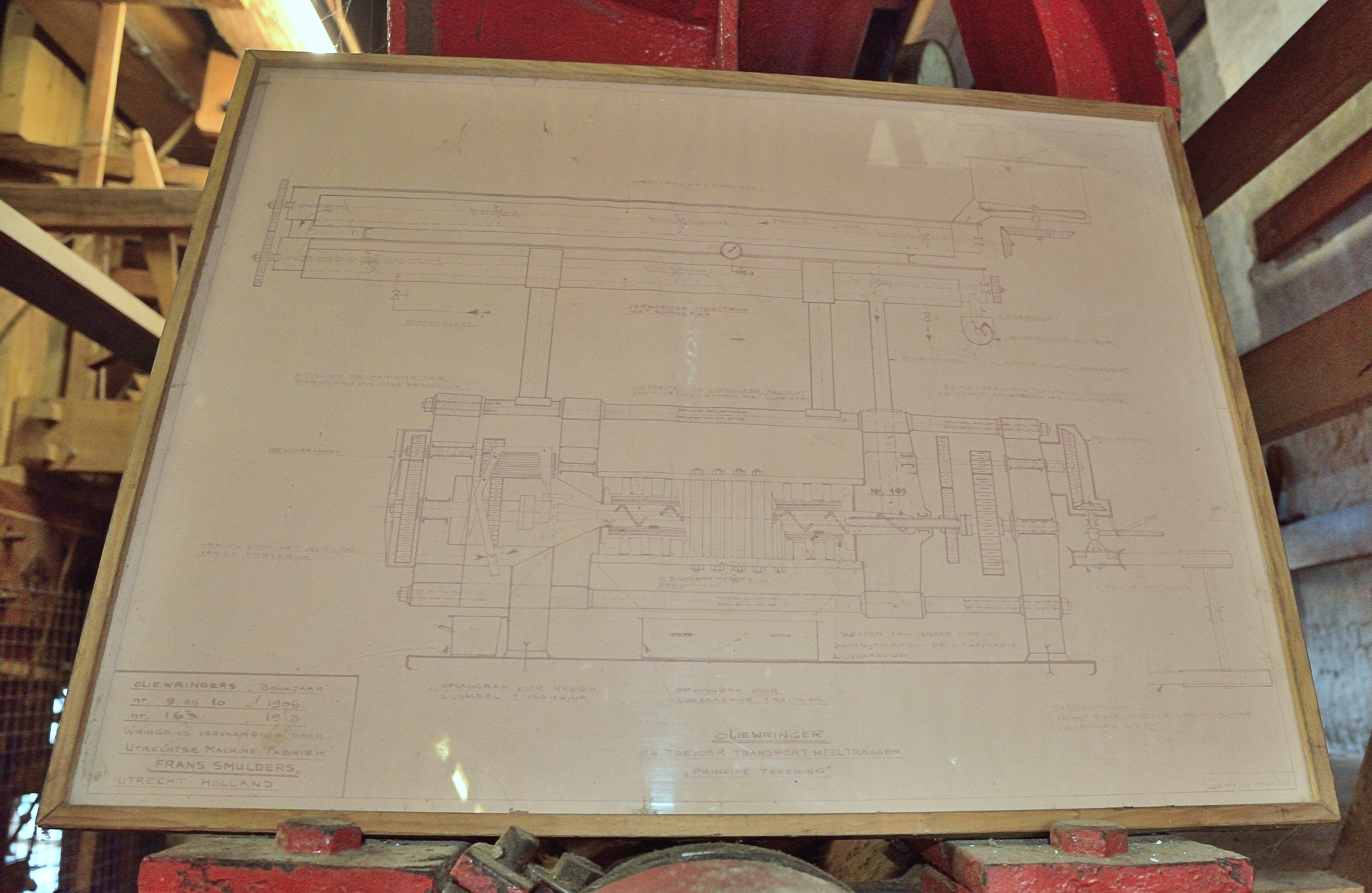 De Wachter, Zuidlaren, tekening oliewringer voor lijnzaad